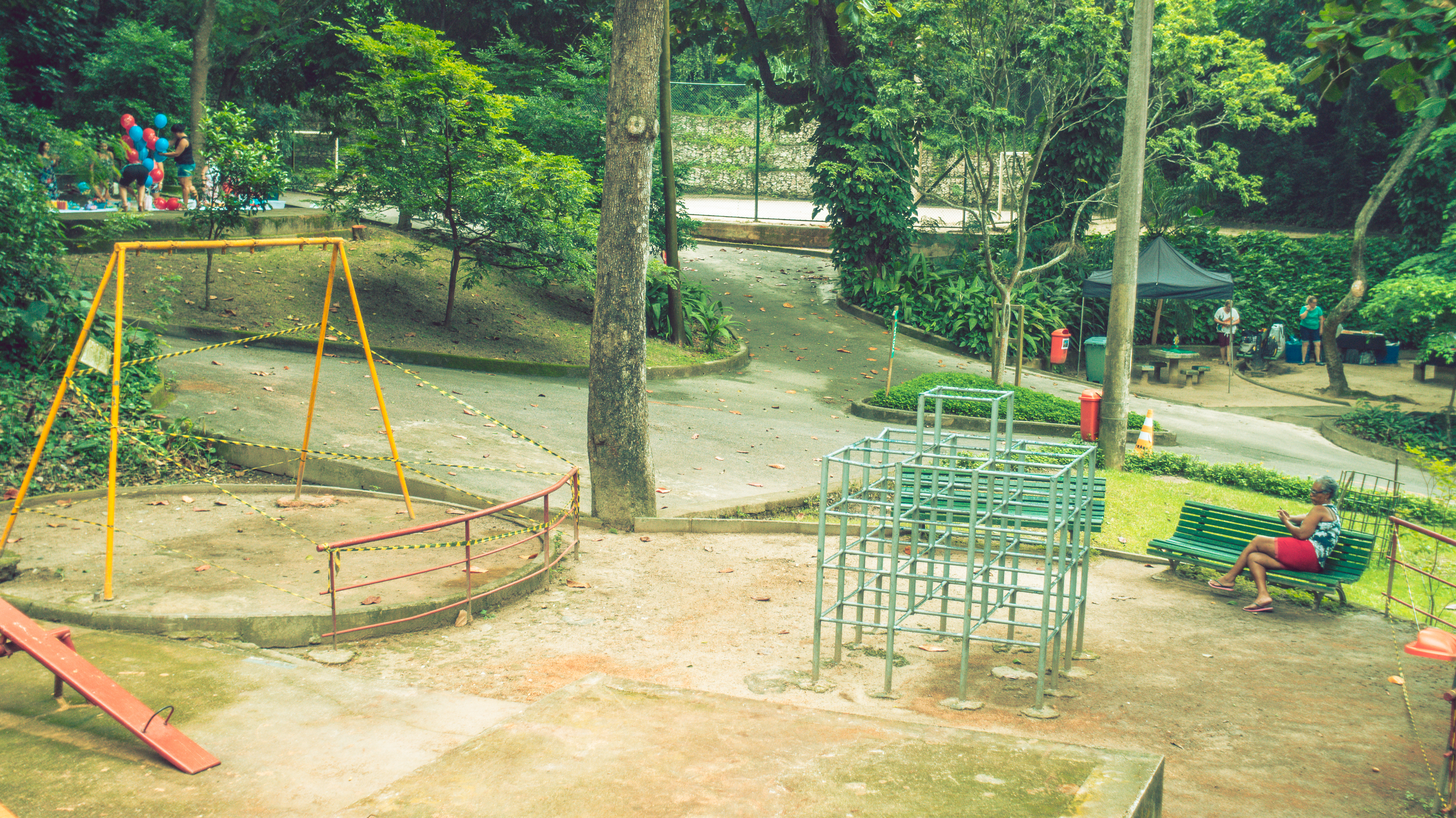 Bem cuidado e com bastante segurança